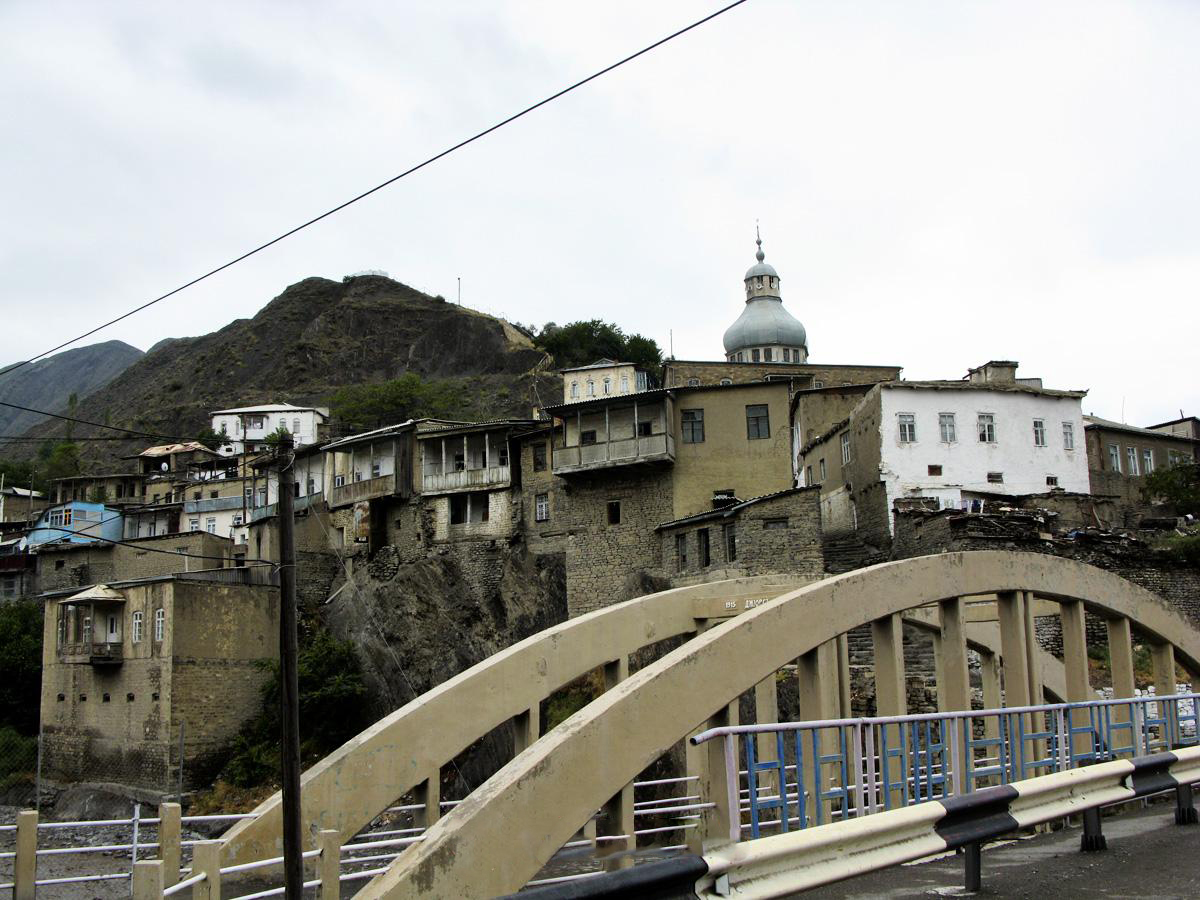 Мост "Джиорс и Дебернарди" в Ахтах